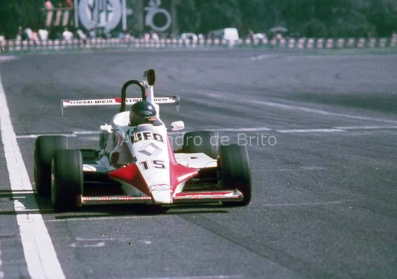 Miguel Ángel Guerra (Berta-Renault), Buenos Aires, F2 Codasur 1986.